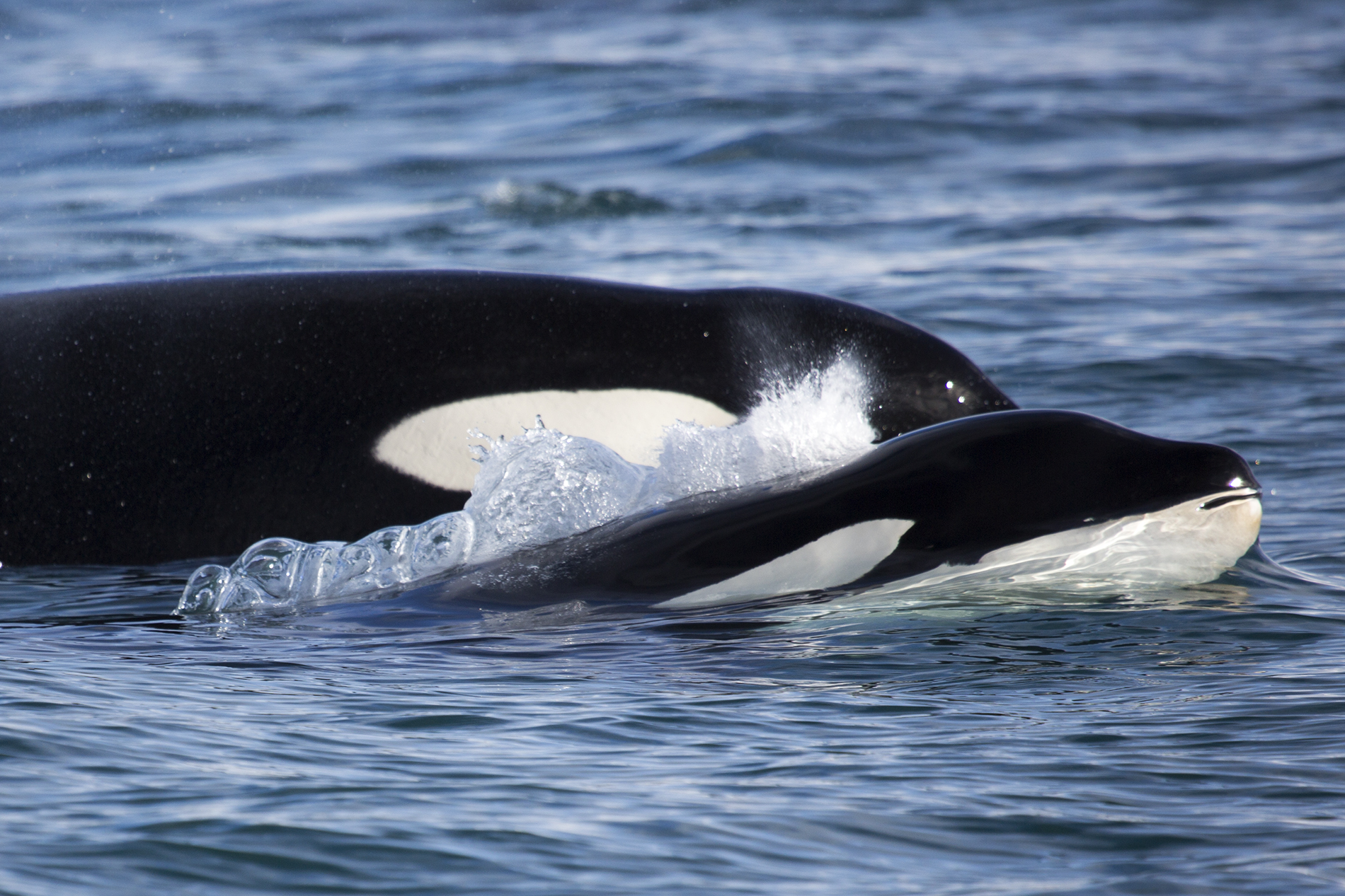 whale watching